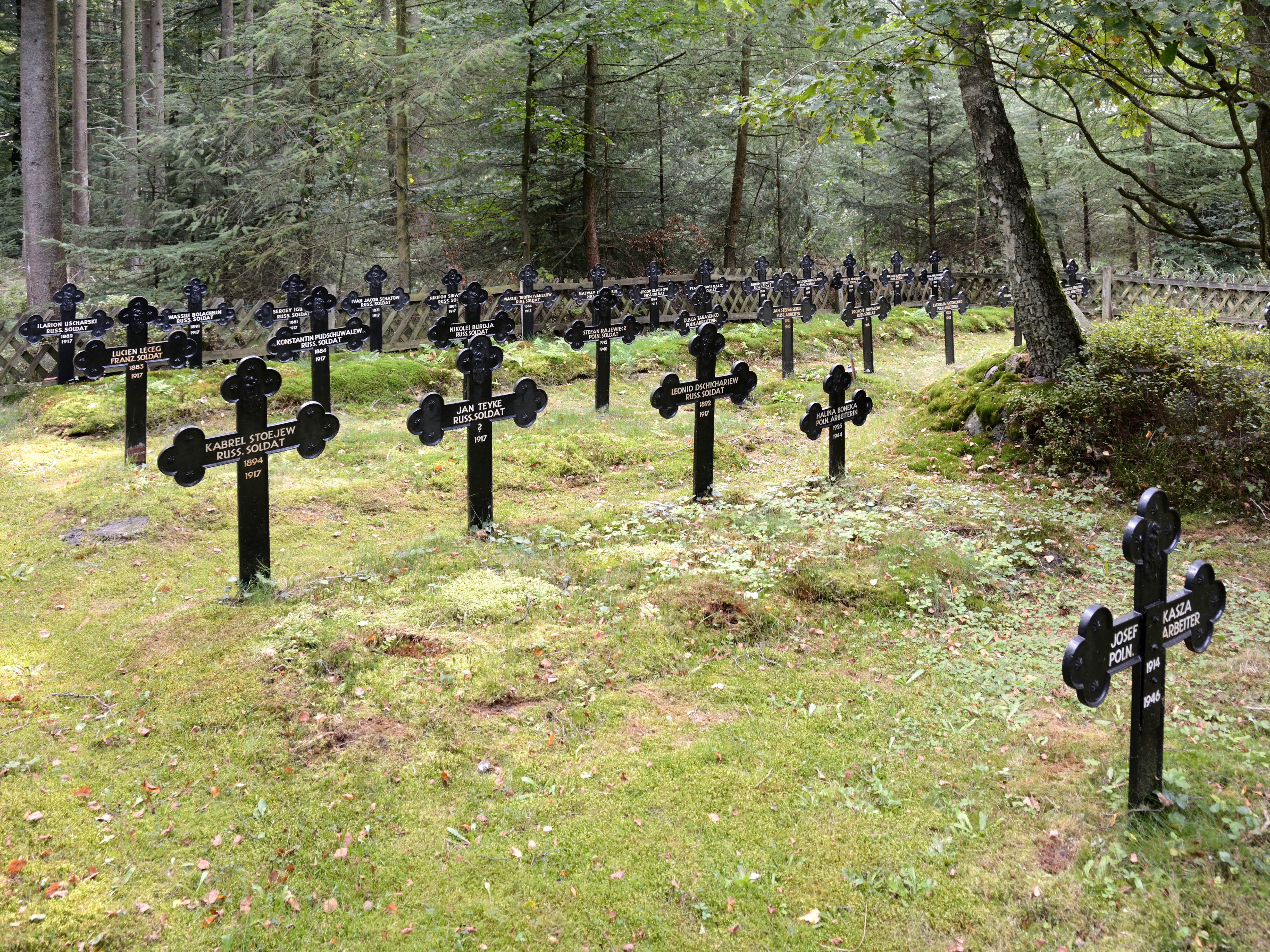 Eine im Wald gelegene Kriegsgräberstätte an der Landesstrasse 121 in Schleswig-Holstein. Trotz der einsamen Lage wirkt die Gedenkstätte gepflegt.